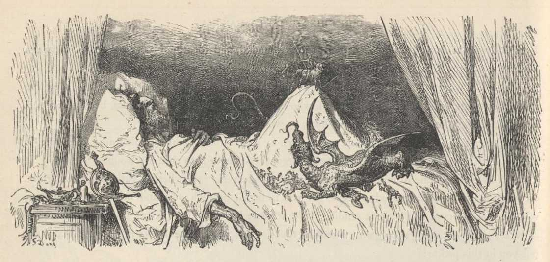 "Dom Quixote convalescente" (1863), iIustração por Gustave Doré para “Don Quixote“ de Miguel de Cervantes.